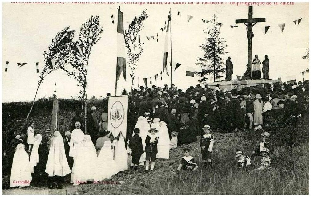 Le calvaire de Sainte-Béline. Pélerinage annuel du lundi de Pentecôte